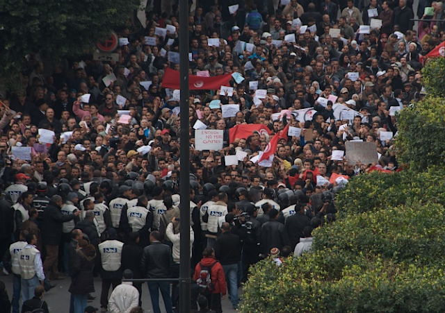 Demonstrators face police lines on Aveunue Bourguiba, Central Tunis